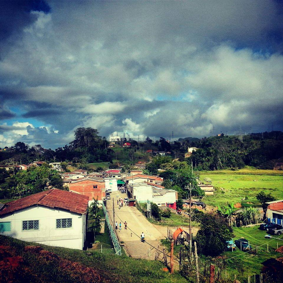 Foto tomada desde "El cerro la cruz" o mejor conocido como "El alto de la cruz"